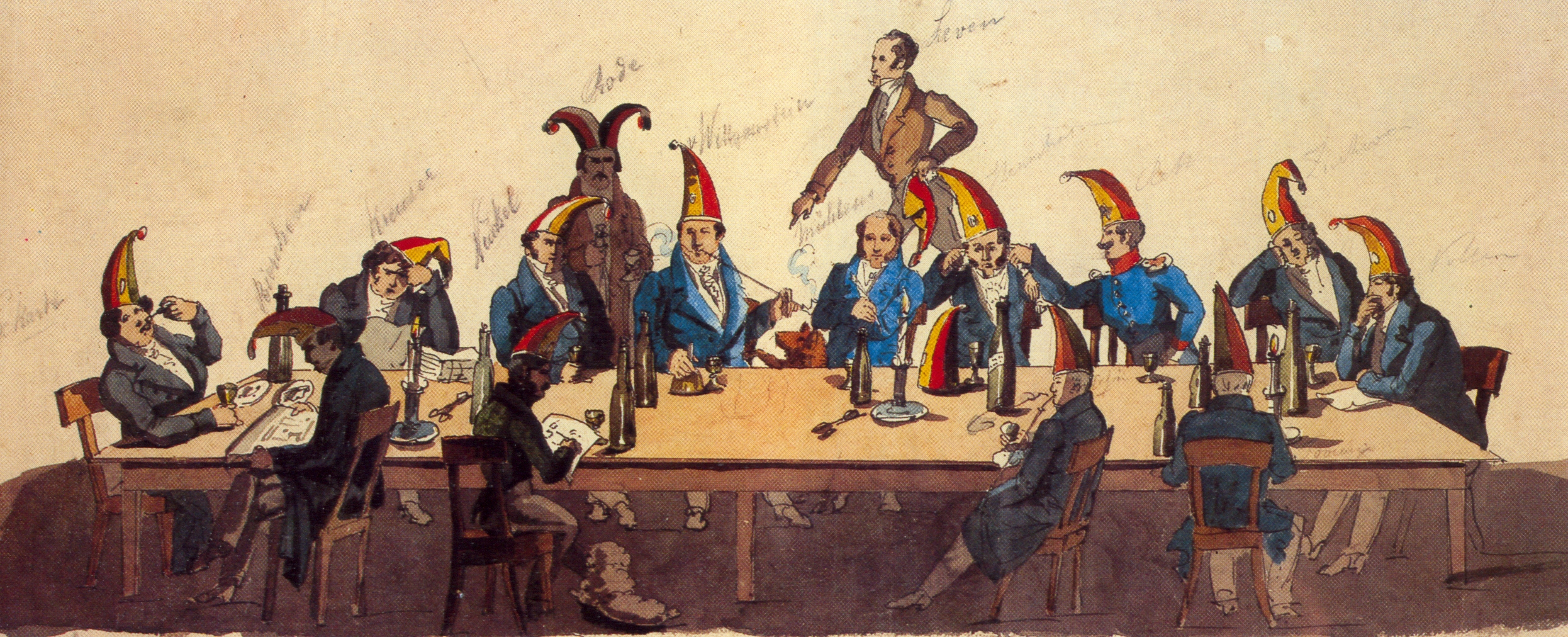 1823 Mitglieder des Festkomitees